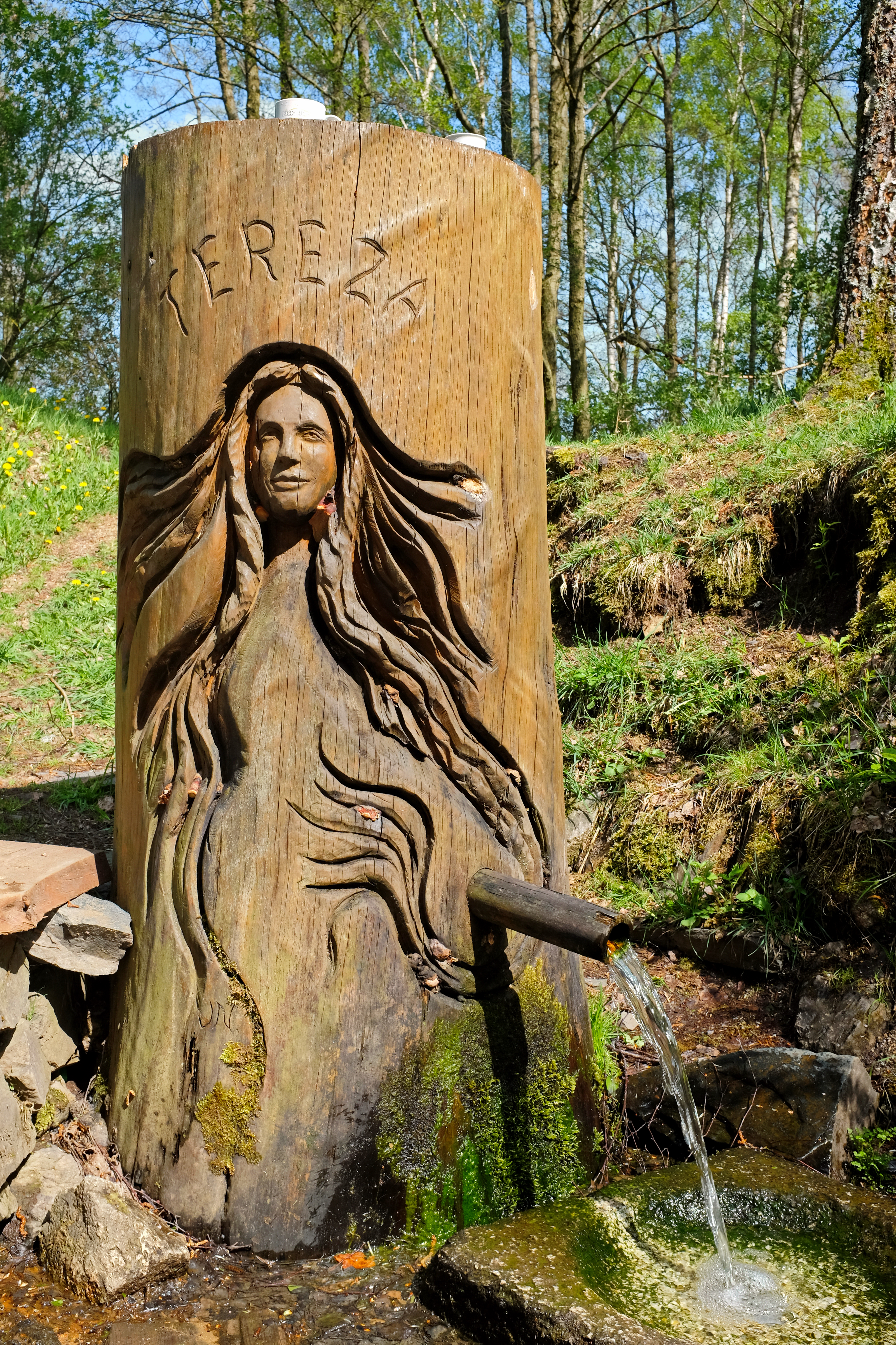 Minerální pramen Tereza, Lázně Kynžvart, okres Cheb